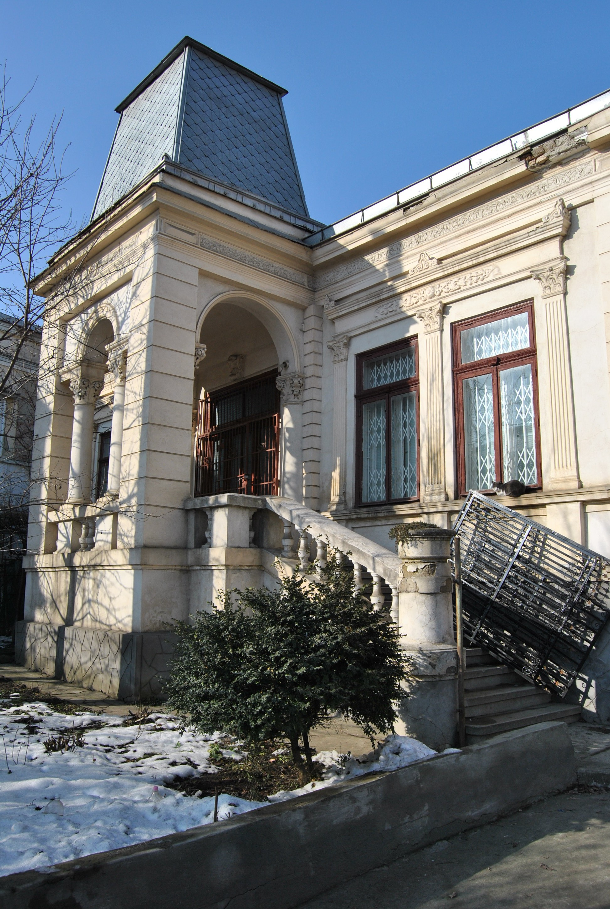 Casă - Str. Cuza Voda nr.45